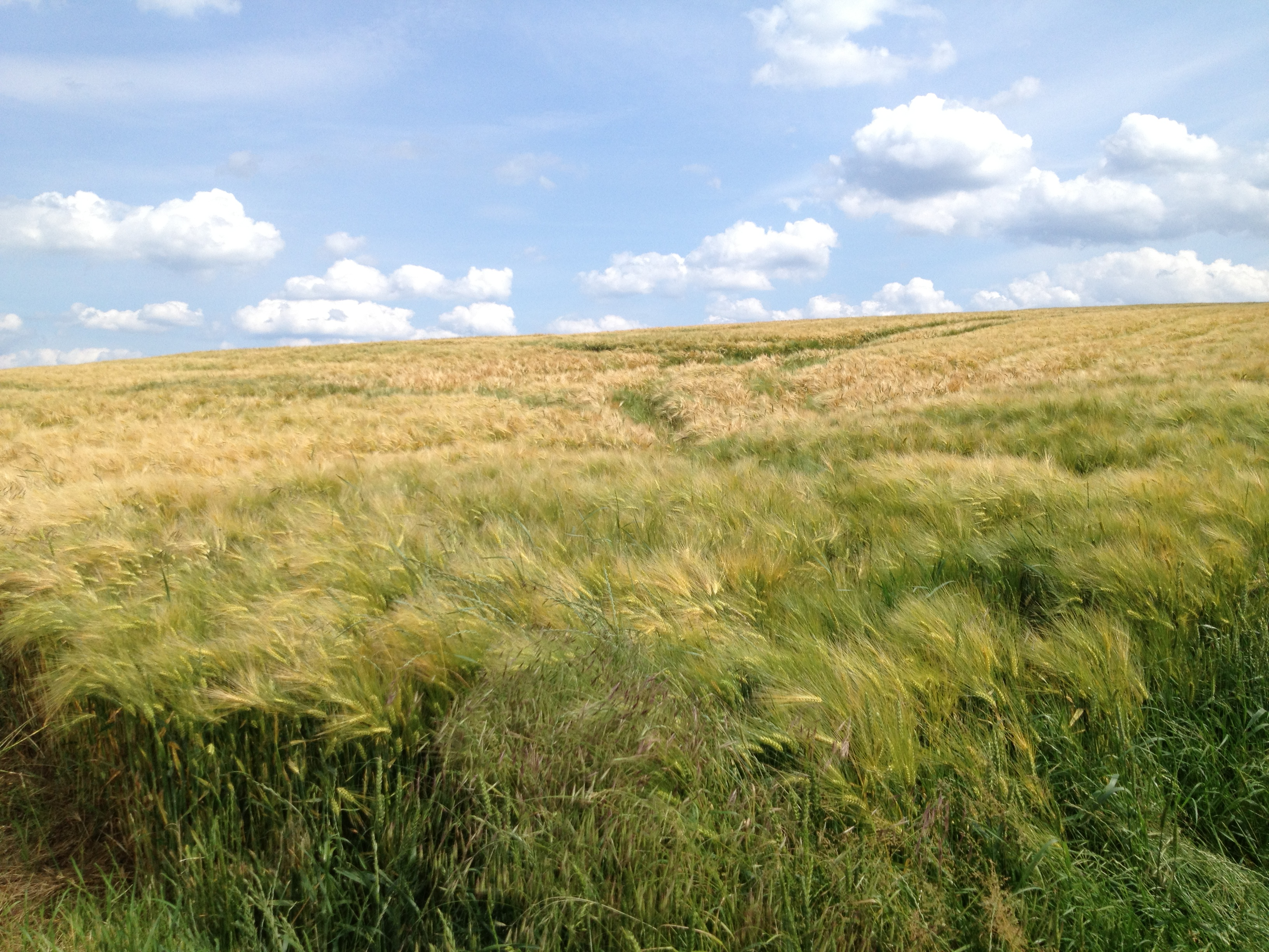 Kassel-Steig nahe Großenritte